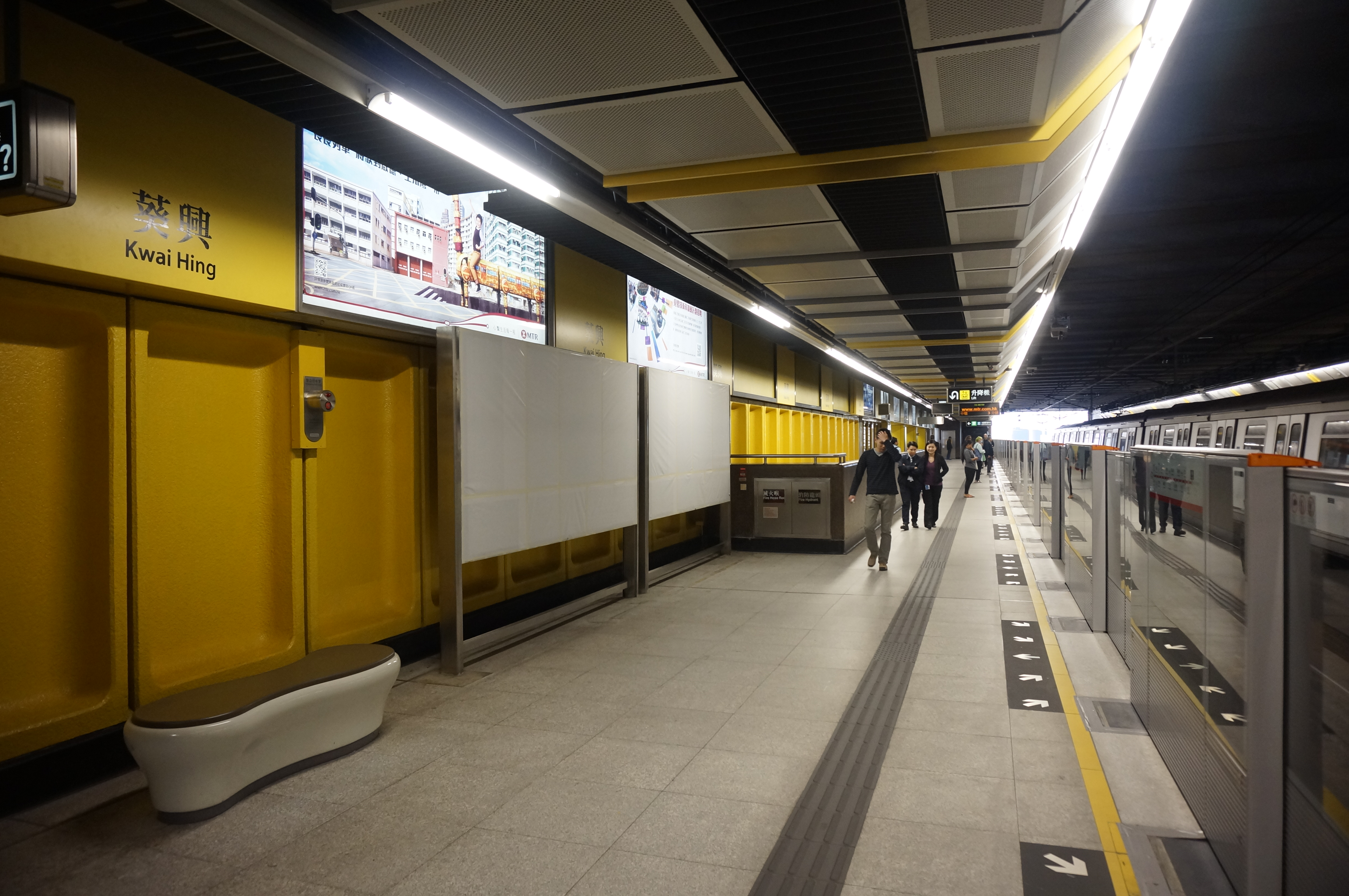 港鐵葵興站月台